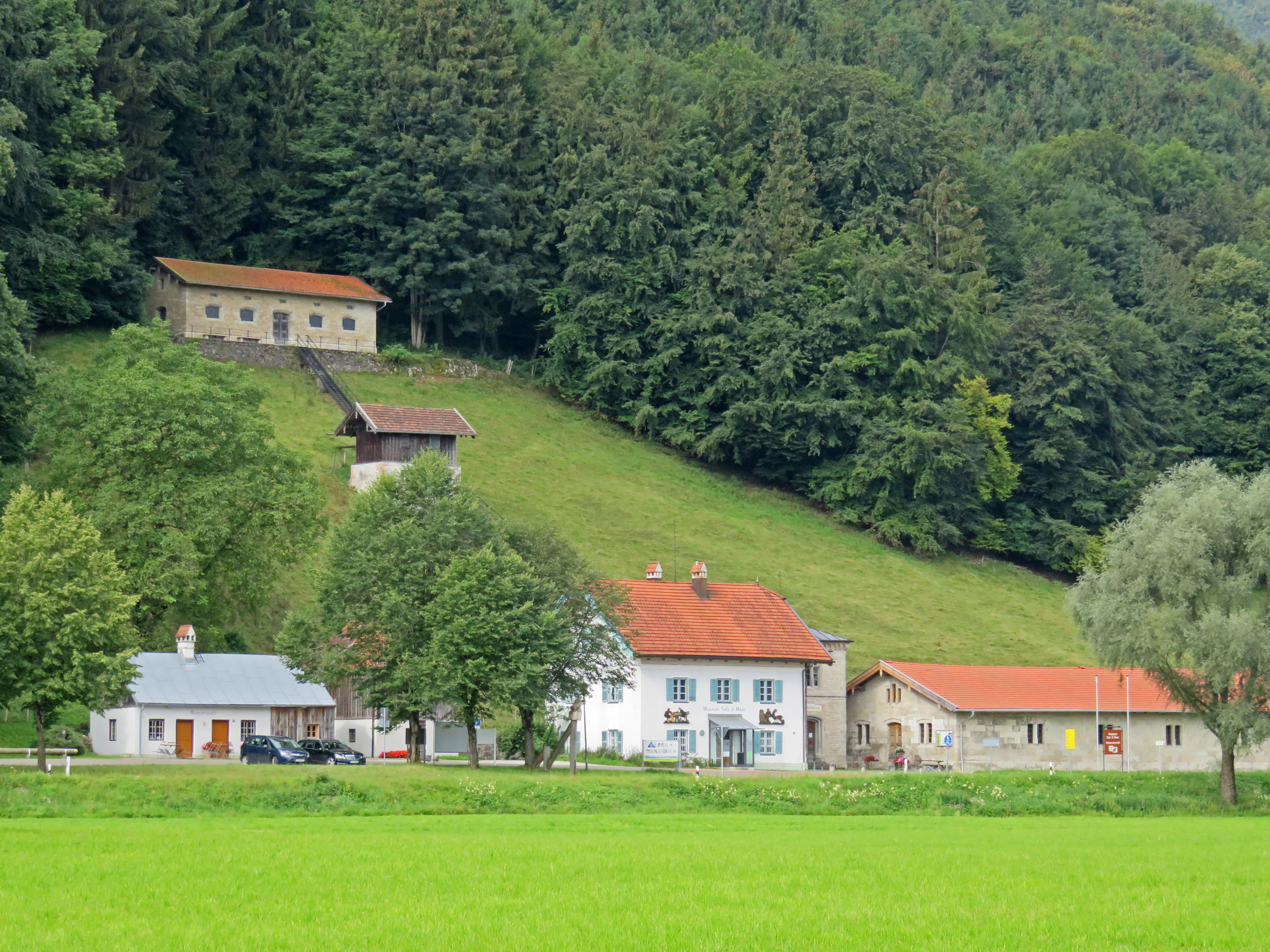 Gebäudeensemble der Solepumpstation Klaushäusl bei Rottau/Grassau, beherbergt heute das Museum Salz & Moor. Ausstellung zur Technikgeschichte der Soleleitung von Reichenhall nach Rosenheim, die als eine der ersten Pipelines der Welt gilt, sowie zum Leben im angrenzenden Hochmoor.This is a photograph of an architectural monument.